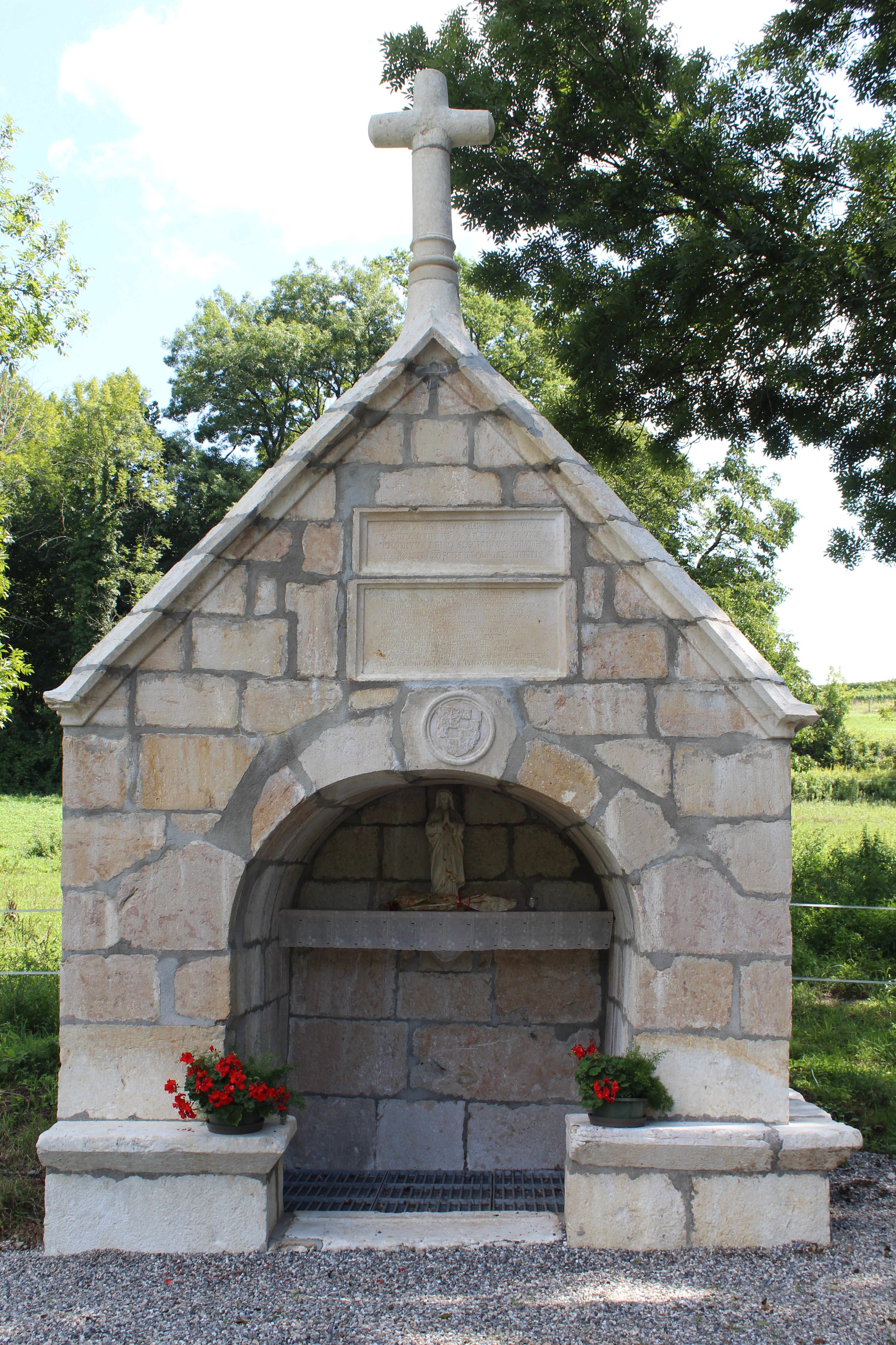 Sainte-Fontaine, Flaxieu.